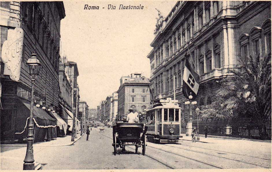 Vettura tranviaria Ringhoffer della SRTO lungo via Nazionale. A destra palazzo Koch. Foto ante 1930, quando la linea tramviaria fu abolita.